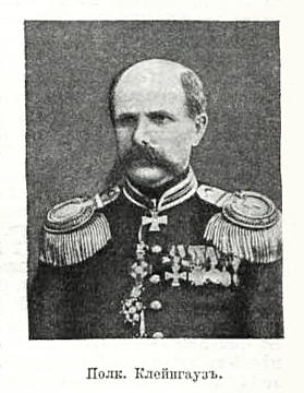 Полковник РИА, командир Костромского 19-го пехотного полка Игнатий Михайлович Клейнгауз. Эта фотография была использована для иллюстрирования статьи «Костромской, 19-й пехотный, полк» опубликованной в тринадцатом томе «Военной энциклопедии», который был издан книгоиздательским товариществом И. Д. Сытина в 1913 году в столице Российской империи городе Санкт-Петербурге. Более подробное описание к этой картинке можно прочесть в указанной выше статье.